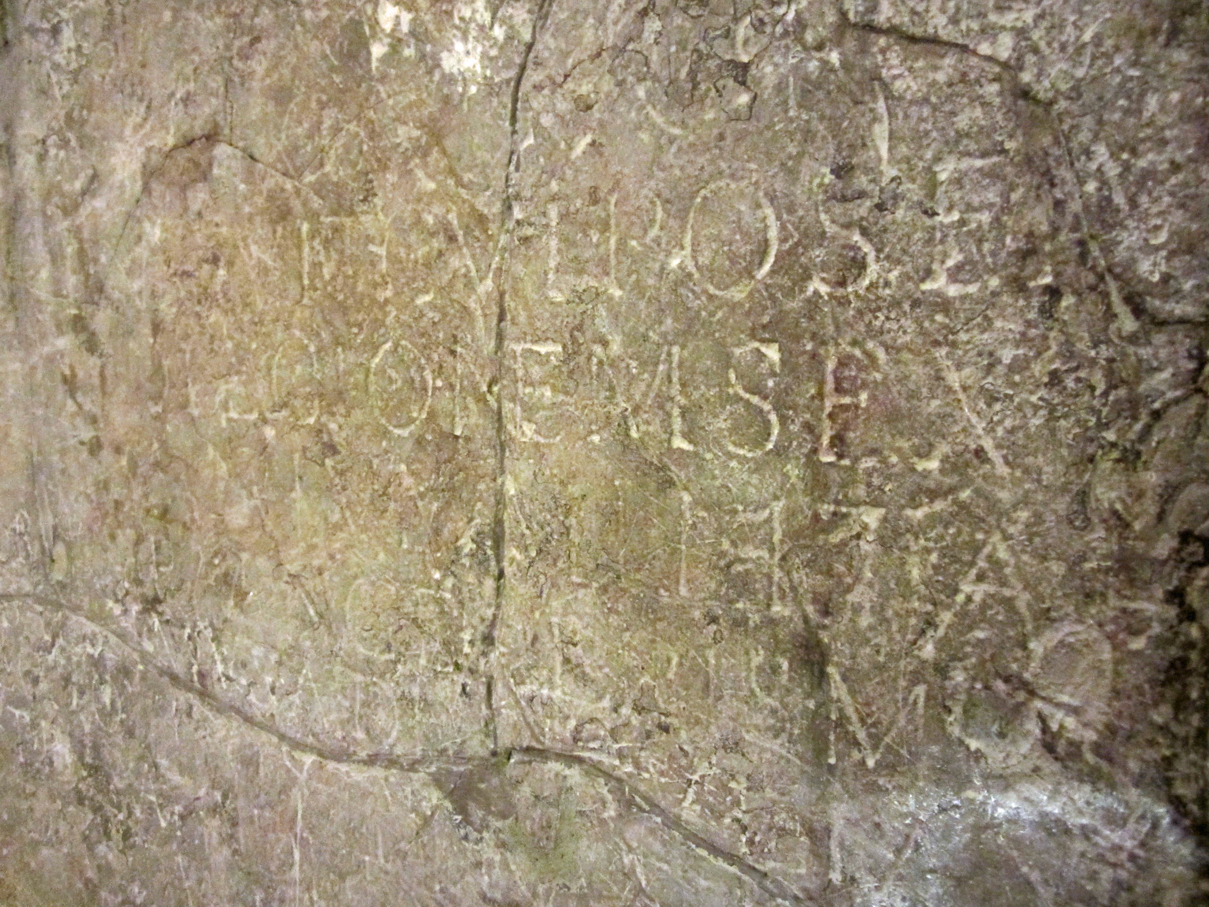 Marbre de Thorigny